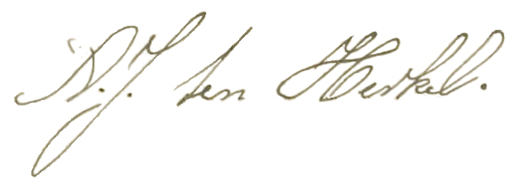 Antoon ten Herkel signature.